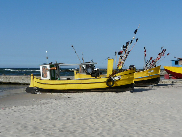 Kutry na plaży. Kutry rybackie w Niechorzu. Przystań morska w Niechorzu.